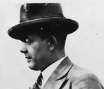 Bild von Ludwig Haas (1. Vorsitzender des TSV Solln)